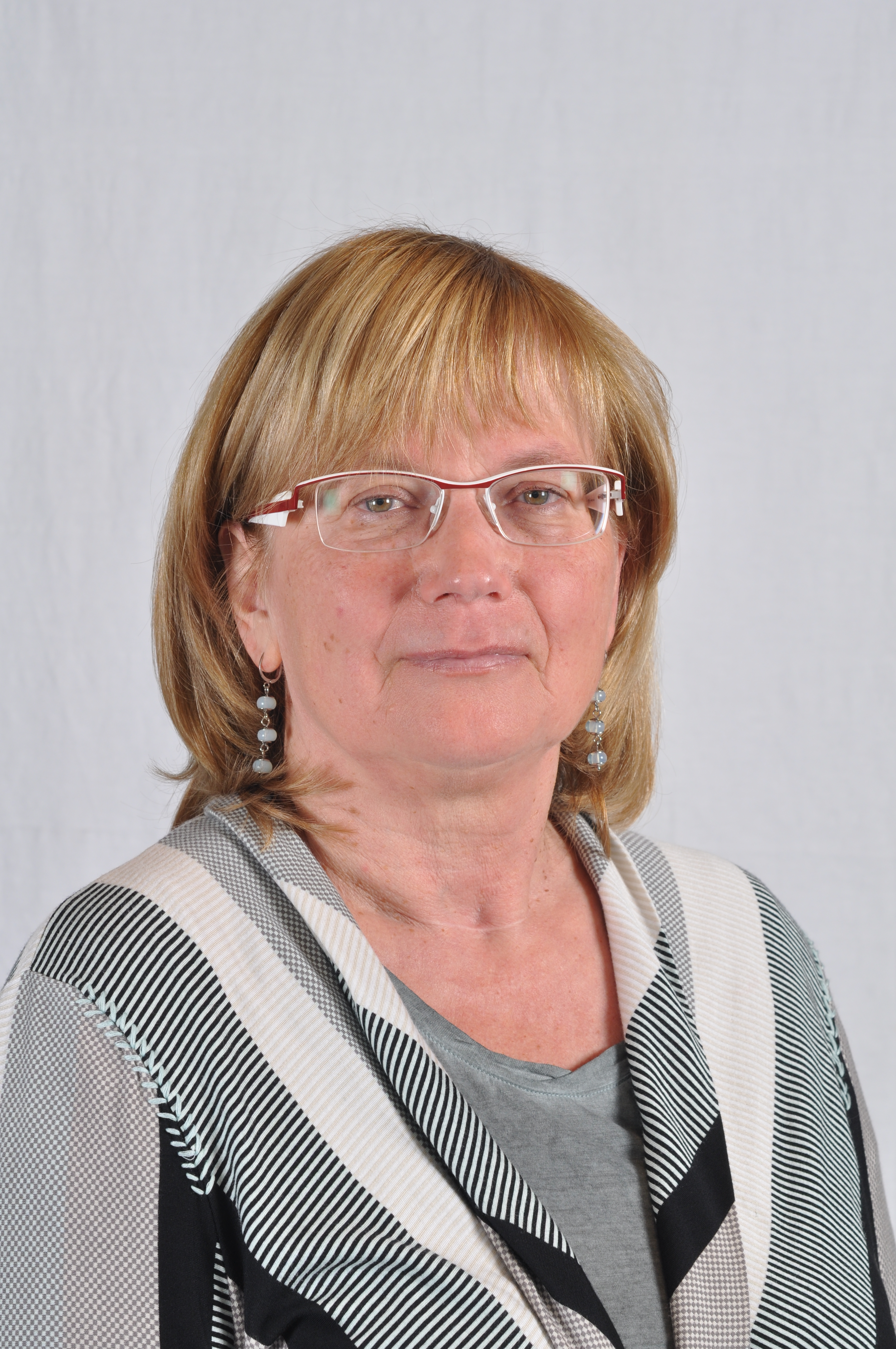 Dieses Foto entstand aufgrund einer Zusammenarbeit mit dem Thüringer Landtag. Das Fotoprojekt wurde organisatorisch und finanziell unterstützt vom Verein Skillshare e.V., einem eingetragenen gemeinnützigen Verein mit dem Ziel, Bildung zu fördern durch Unterstützung der Erstellung, Sammlung und Verbreitung freien Wissens. Beim Landtagsprojekt Thüringen vom 18. – 19. Mai 2011 wurden zahlreiche Mitglieder des Thüringer Landtages fotografiert, um Bilder von ihnen für Wikimediaprojekte zur Verfügung zu stellen. Personality rights warningAlthough this work is freely licensed or in the public domain, the person(s) shown may have rights that legally restrict certain re-uses unless those depicted consent to such uses. In these cases, a model release or other evidence of consent could protect you from infringement claims.